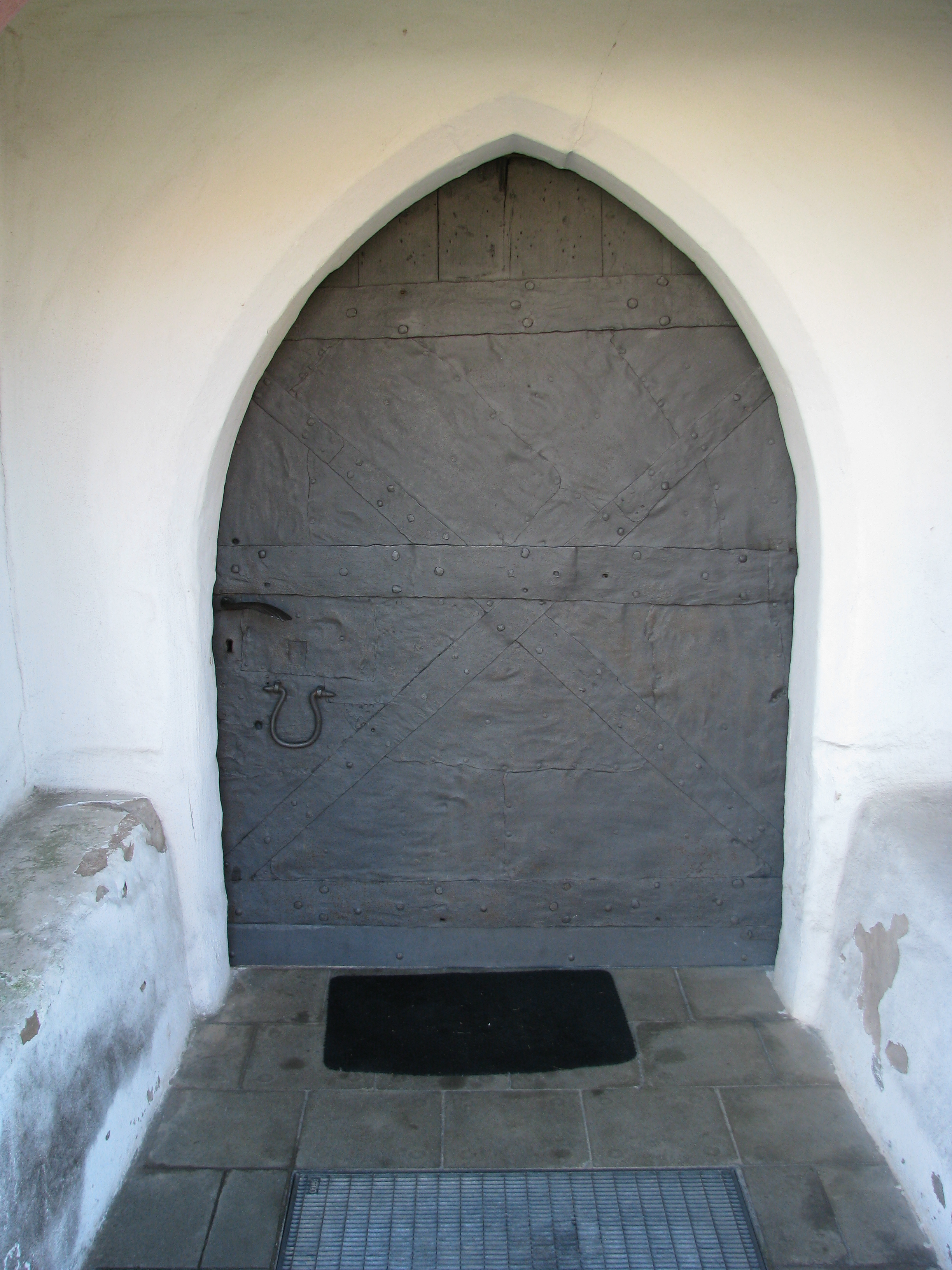 Mindorf, Ortsteil von Hilpoltstein im mittelfränkischen Landkreis Roth, Kath. Kirche St. Stephan